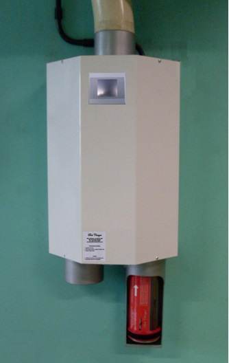 Cabine Automática Hospitalar BestCharger - BPS industria e Comercio LTDA - Industria Brasileira